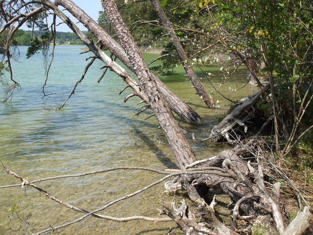 Ostersee, Bayern - Lake Oster, Bavaria